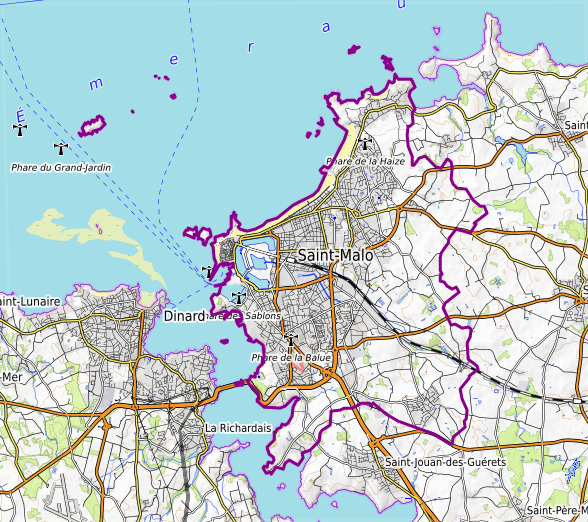 carte réalisée sur umap This map may be incomplete, and may contain errors. Don't rely solely on it for navigation.